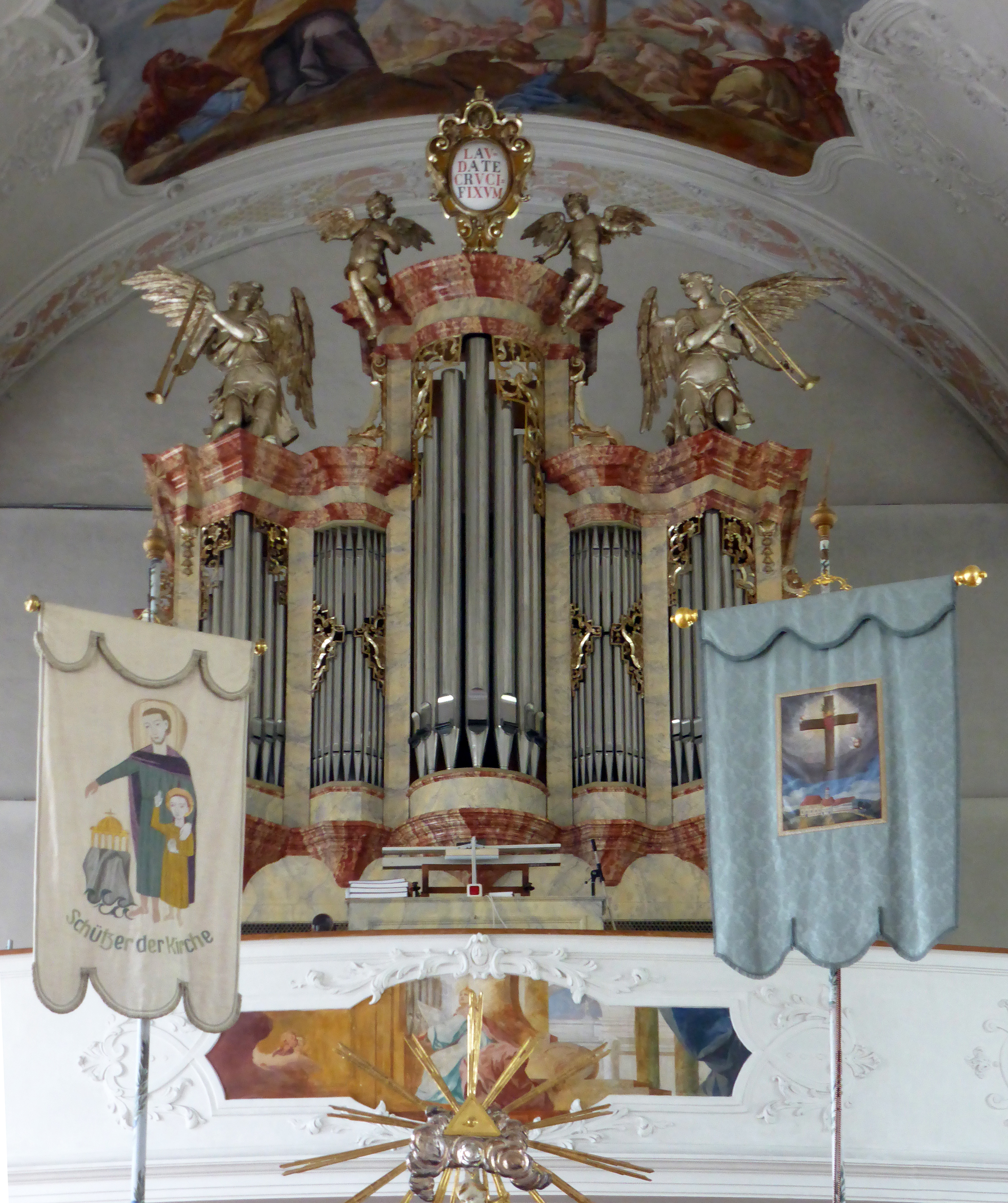 Wikipedia:Süddeutschland-Treffen im Mai 2016 in Kempten (Allgäu). Kloster Heiligkreuz - Orgel.